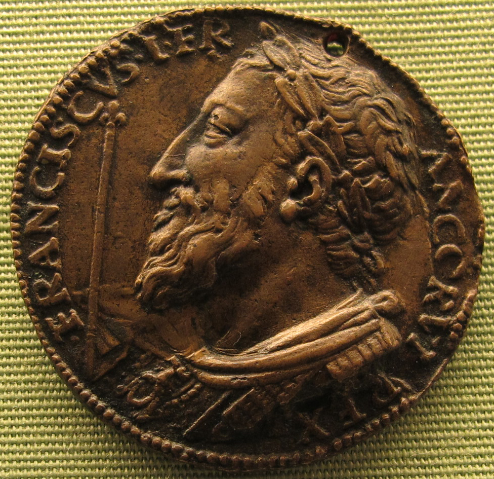 Francesco I di francia, 1538